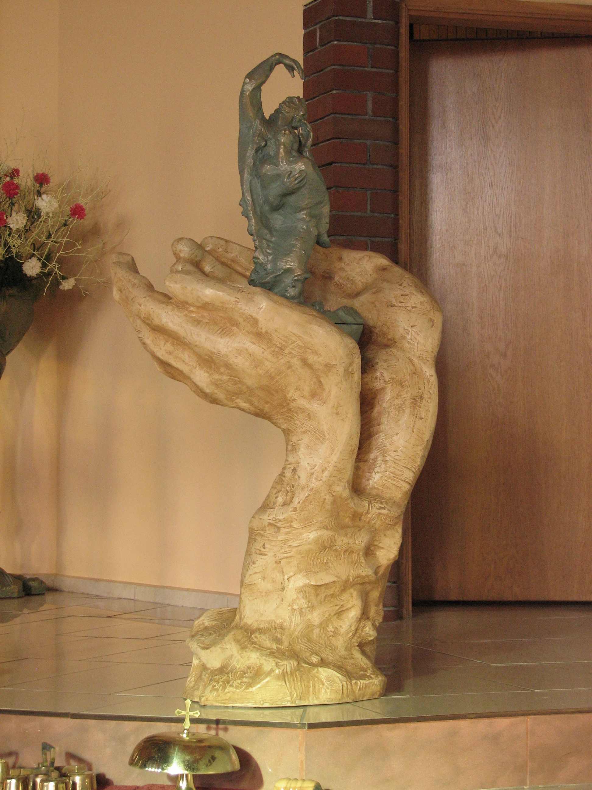 chrzcielnica w parafii św. Rodziny w Tychach